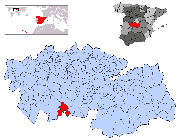 Hontanar en la provincia de Toledo